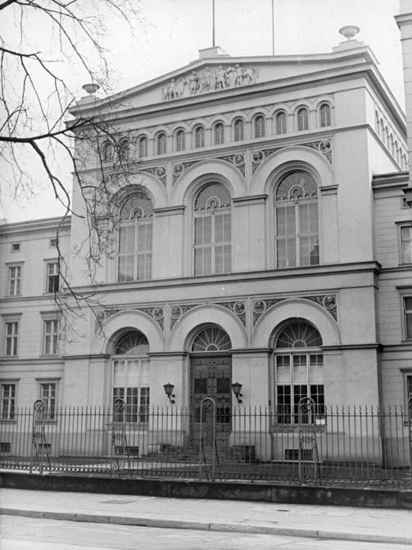 Berlin, Luisenstraße, Aussenministerium Zentralbild Baier 22.4.1958 Berlin,Das Ministerium für Auswärtige Angelegenheiten in der Luisenstrasse.